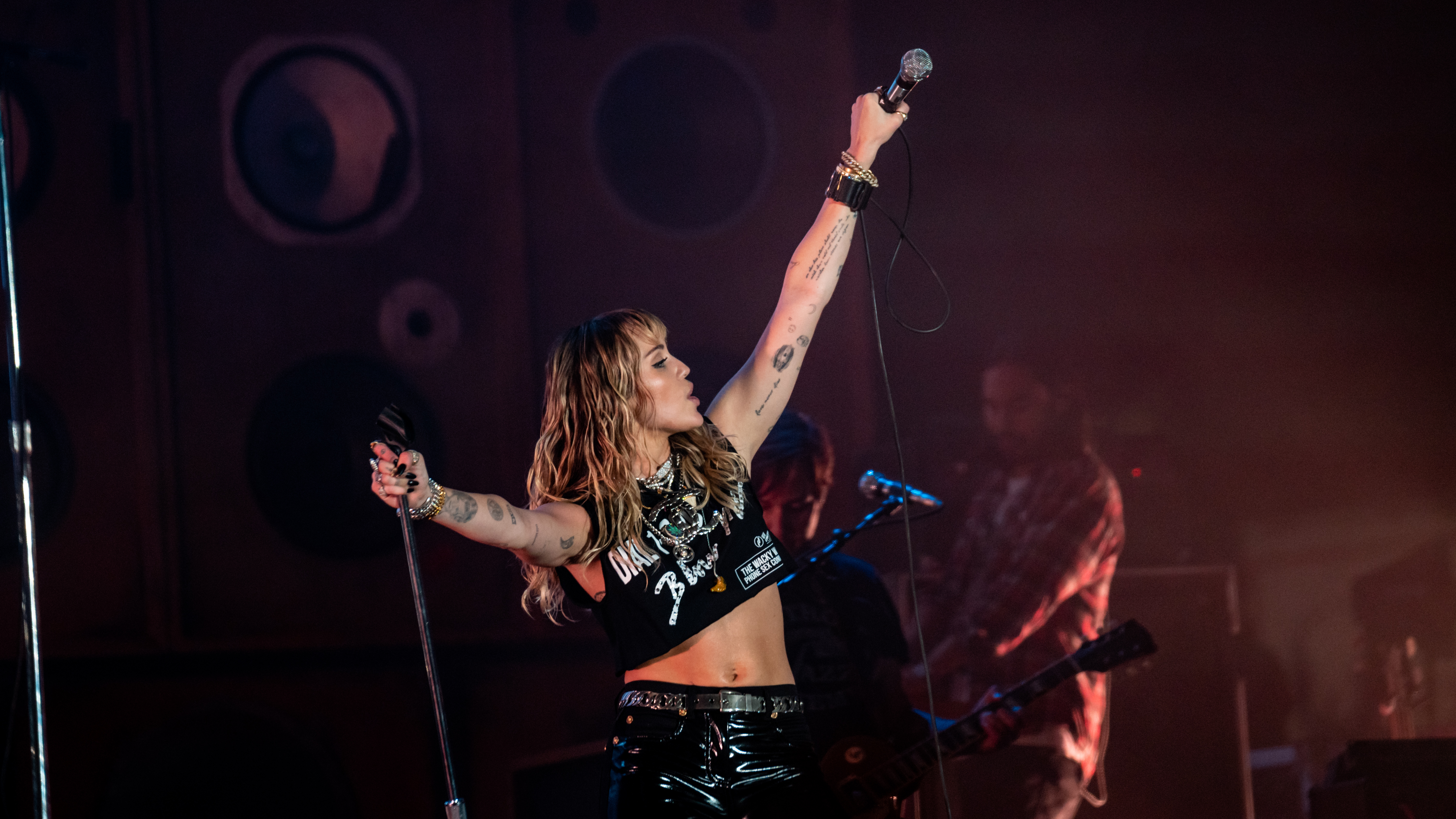 Primavera19_-242